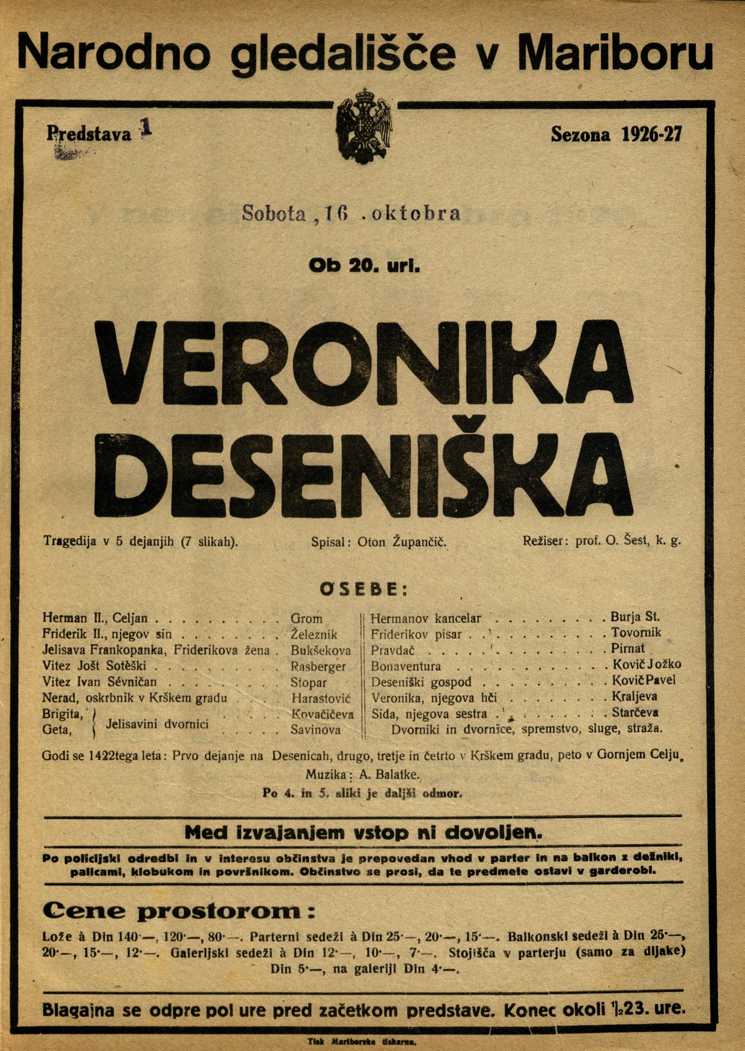 Plakat za predstavo Veronika Deseniška v Narodnem gledališču v Mariboru.